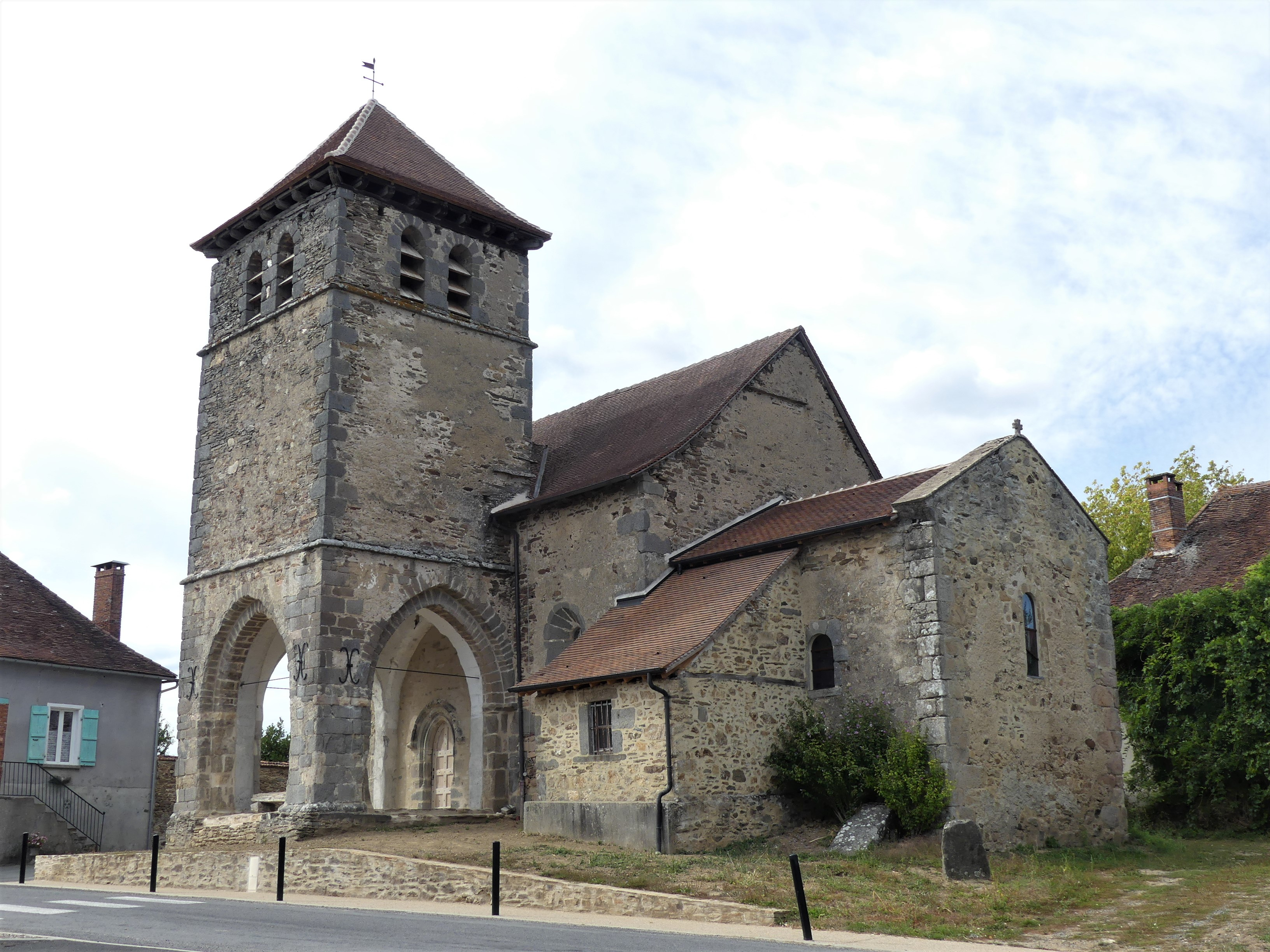 L'église de Saint-Éloy-les-Tuileries, Corrèze, France.